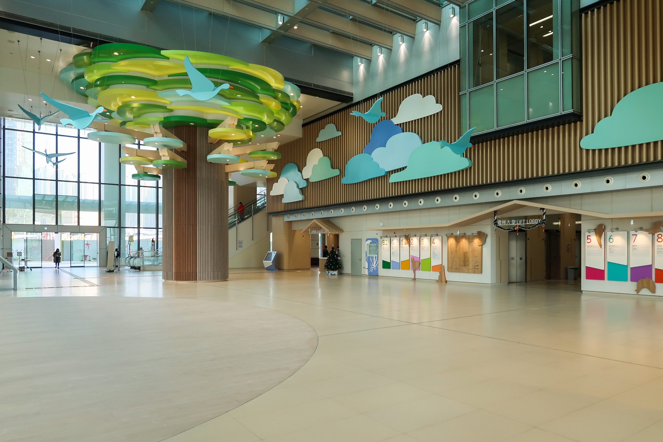 Hong Kong Children's Hospital